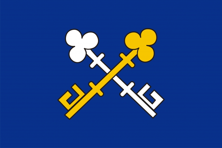 vlajka, Křoví, okres Žďár nad Sázavou